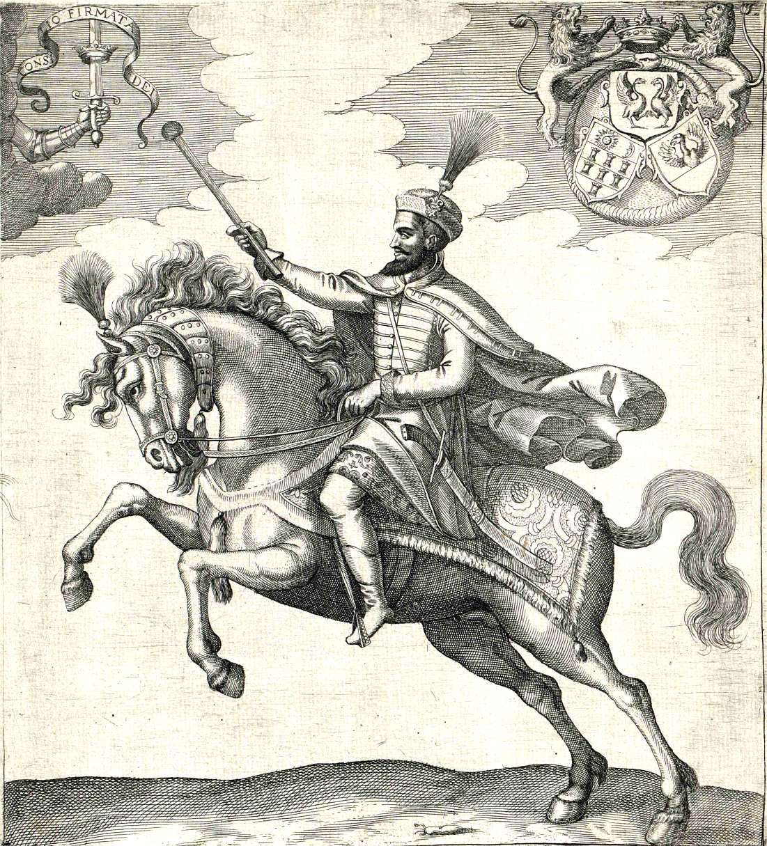 Bethlen Gábor (Marosillye, 1580 – Gyulafehérvár, 1629. november 15.) erdélyi fejedelem (1613–1629), I. Gábor néven megválasztott magyar király (1620–1621), a 17. századi magyar történelem egyik legjelentősebb személyisége.